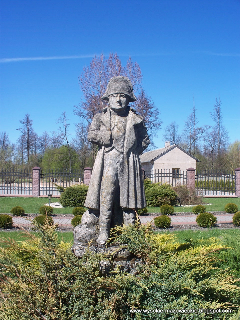 Fotografia ta została zrobiona przeze mnie w Rosochatym Kościelnym przy ul. Kościelnej – pomnik Napoleona znajduje się na prywatnej posesji. Jak przekazują ustne opowieści mieszkających tu ludzi, w okresie wojen napoleońskich w mieście miał ponoć nocować sam Bonaparte. Jak było naprawdę – tego nie wie nikt.